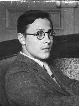 Jacques Sauvegrain.